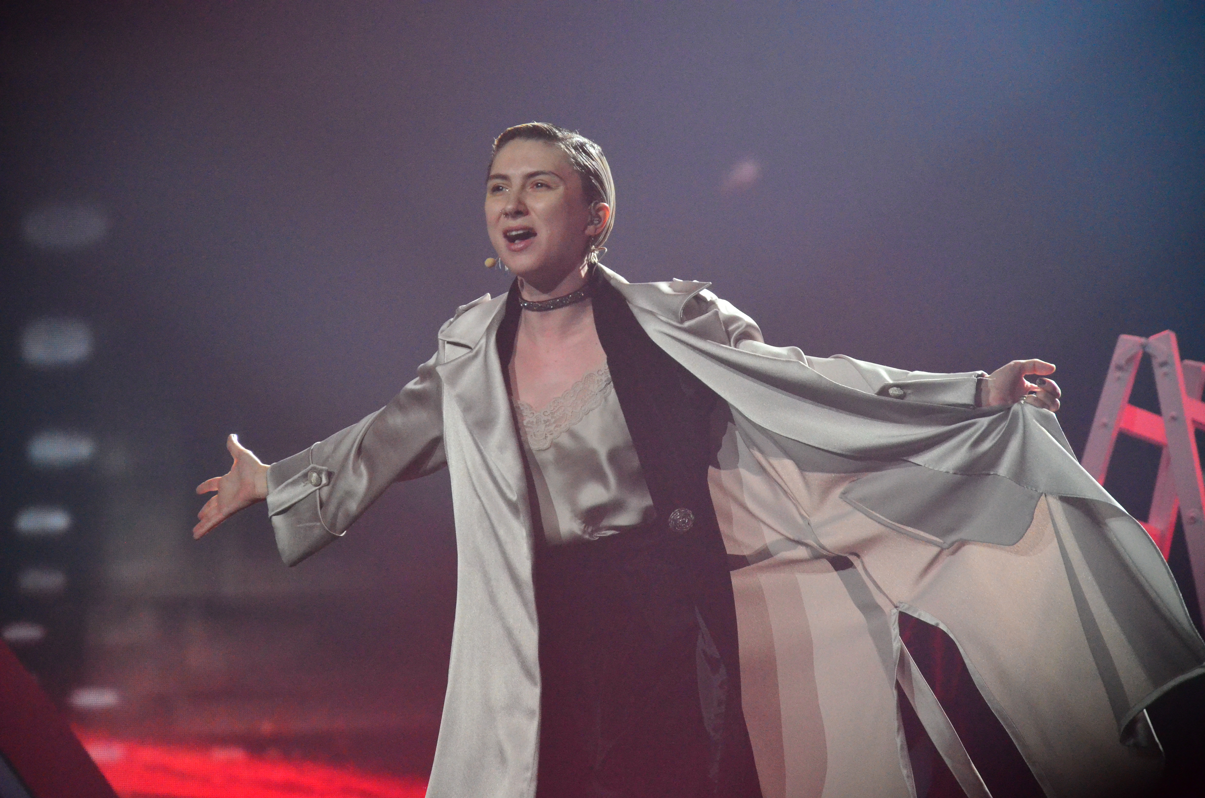 12 травня. Генеральна репетиція фіналу Євробачення 2017. Dihaj (Azerbaijan).